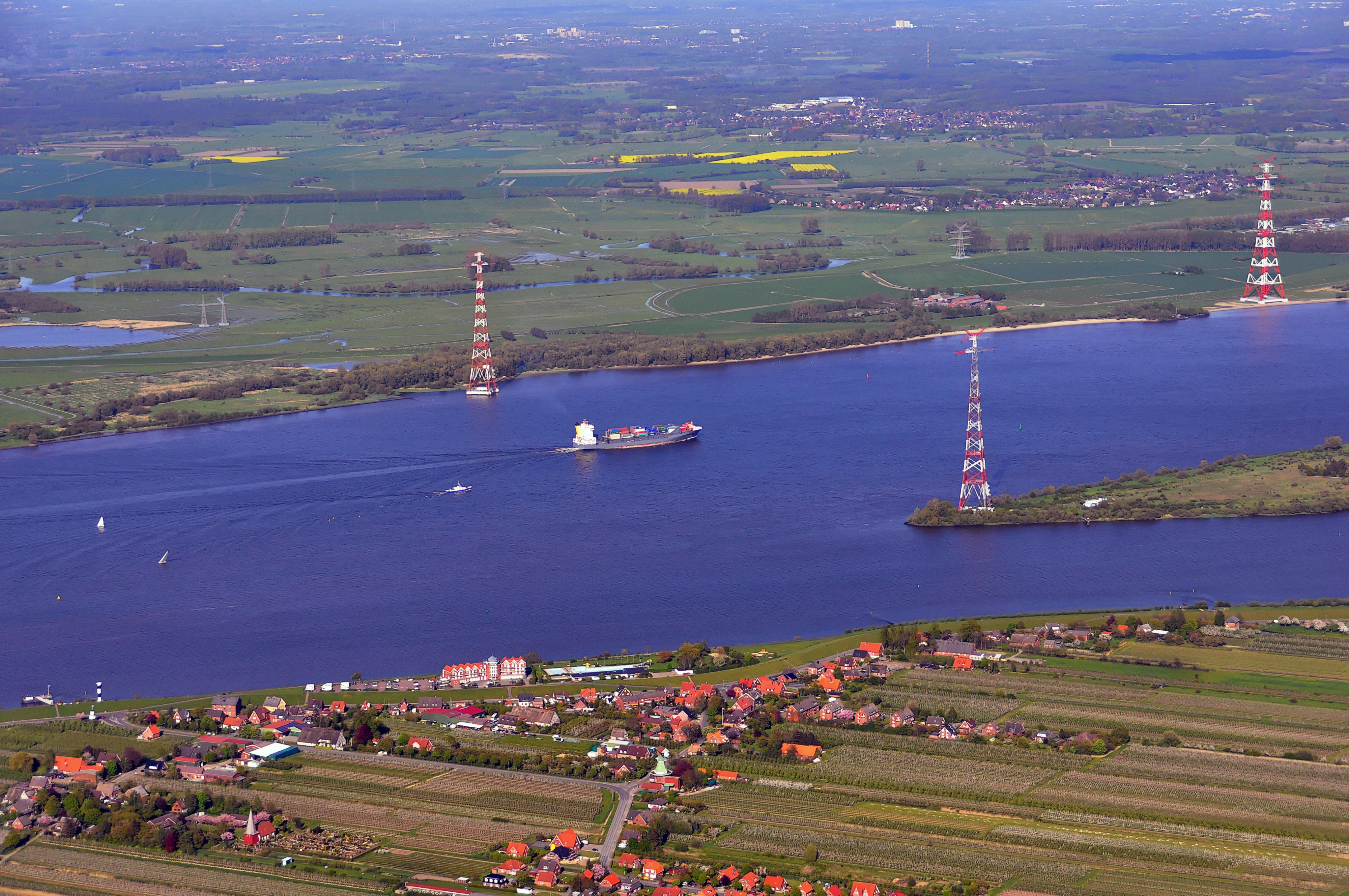 Luftbilder von der Nordseeküste 2012-05